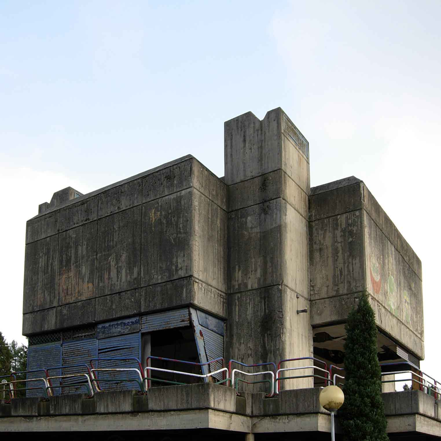 Mini-Zoo Parque de Atracciones de Vizcaya